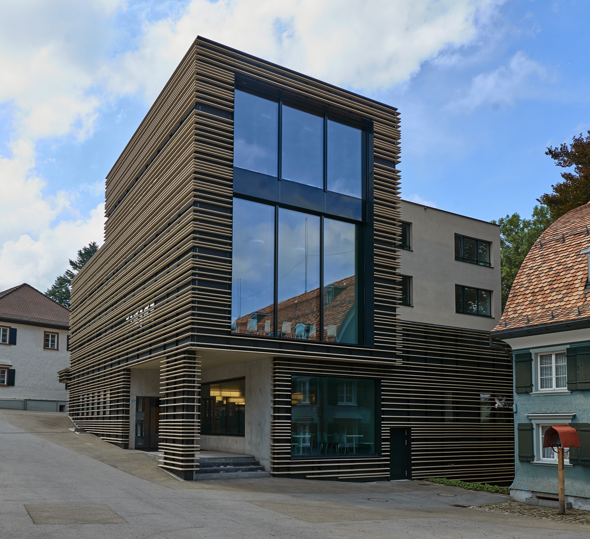 Das neu renovierte Mensa-Gebäude der Kantonsschule Trogen nach der 2. Umbauphase